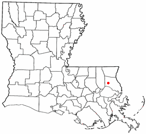 Map